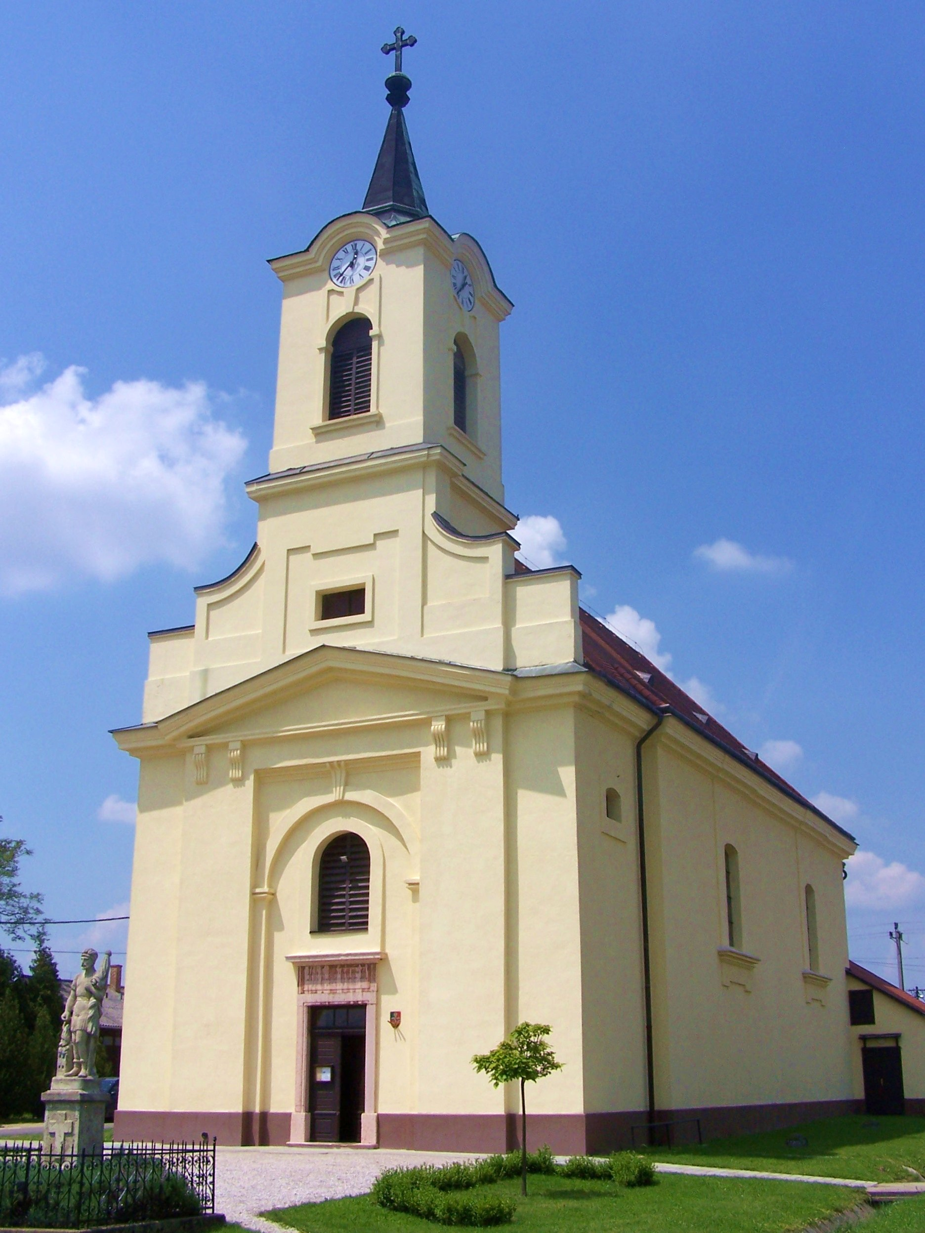 Assisi Szent Ferenc római katolikus templom (Vértesboglár, Kossuth Lajos tér) This is a photo of a monument in Hungary. Identifier: 3966